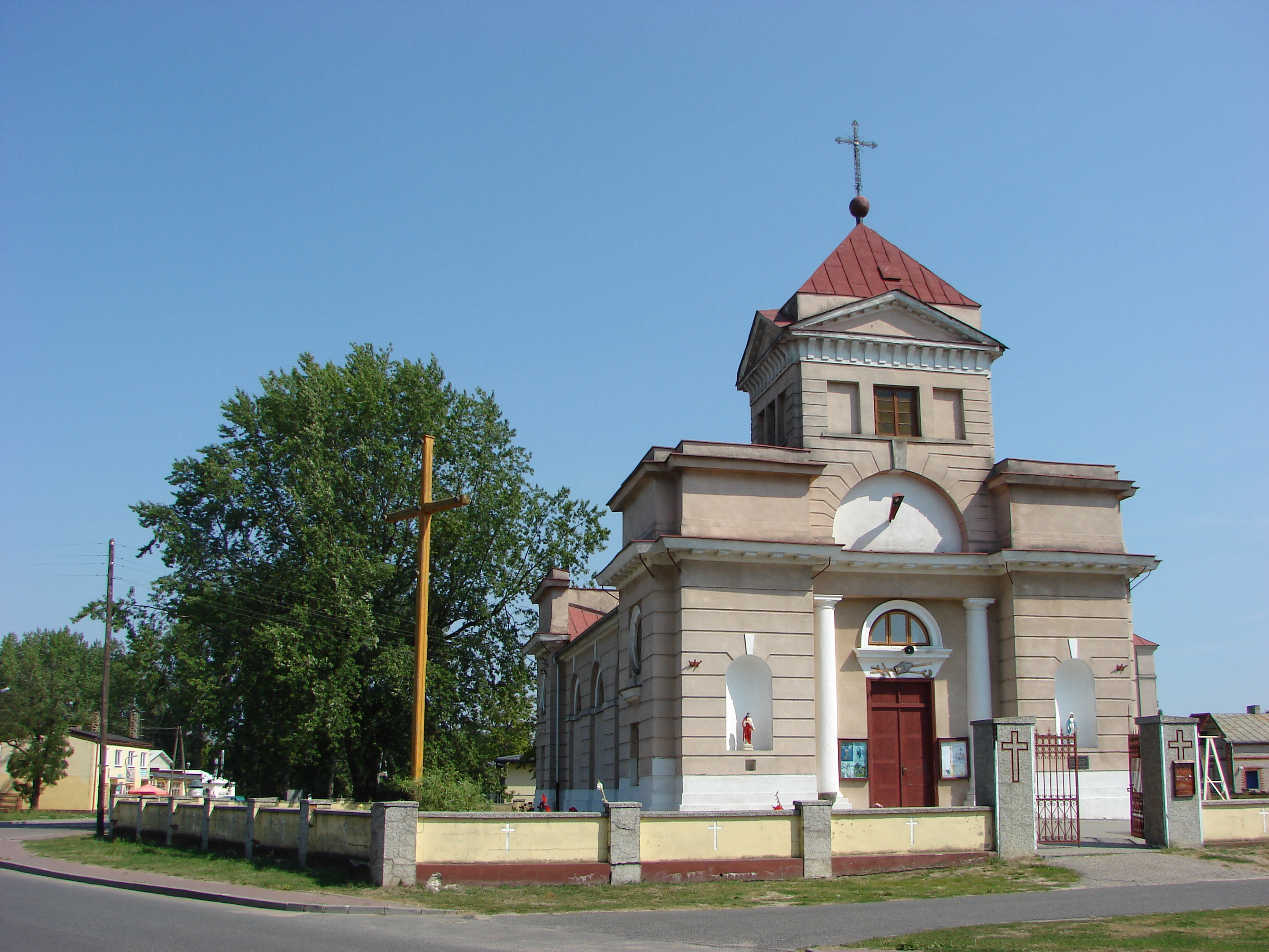 Mazew, kościół parafialny pw. św. Jana Chrzciciela